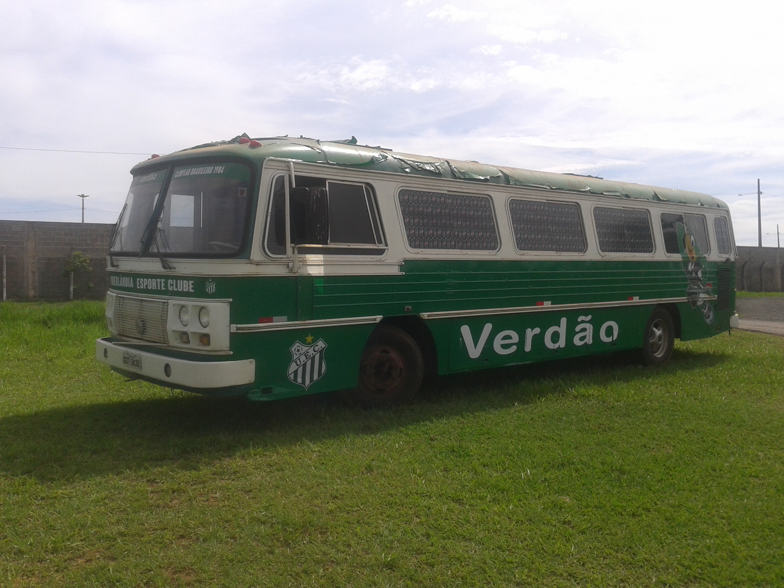 Famoso ônibus exposto na Vila Olímpica. Este automóvel foi o responsável por trazer o time campeão de 1984.